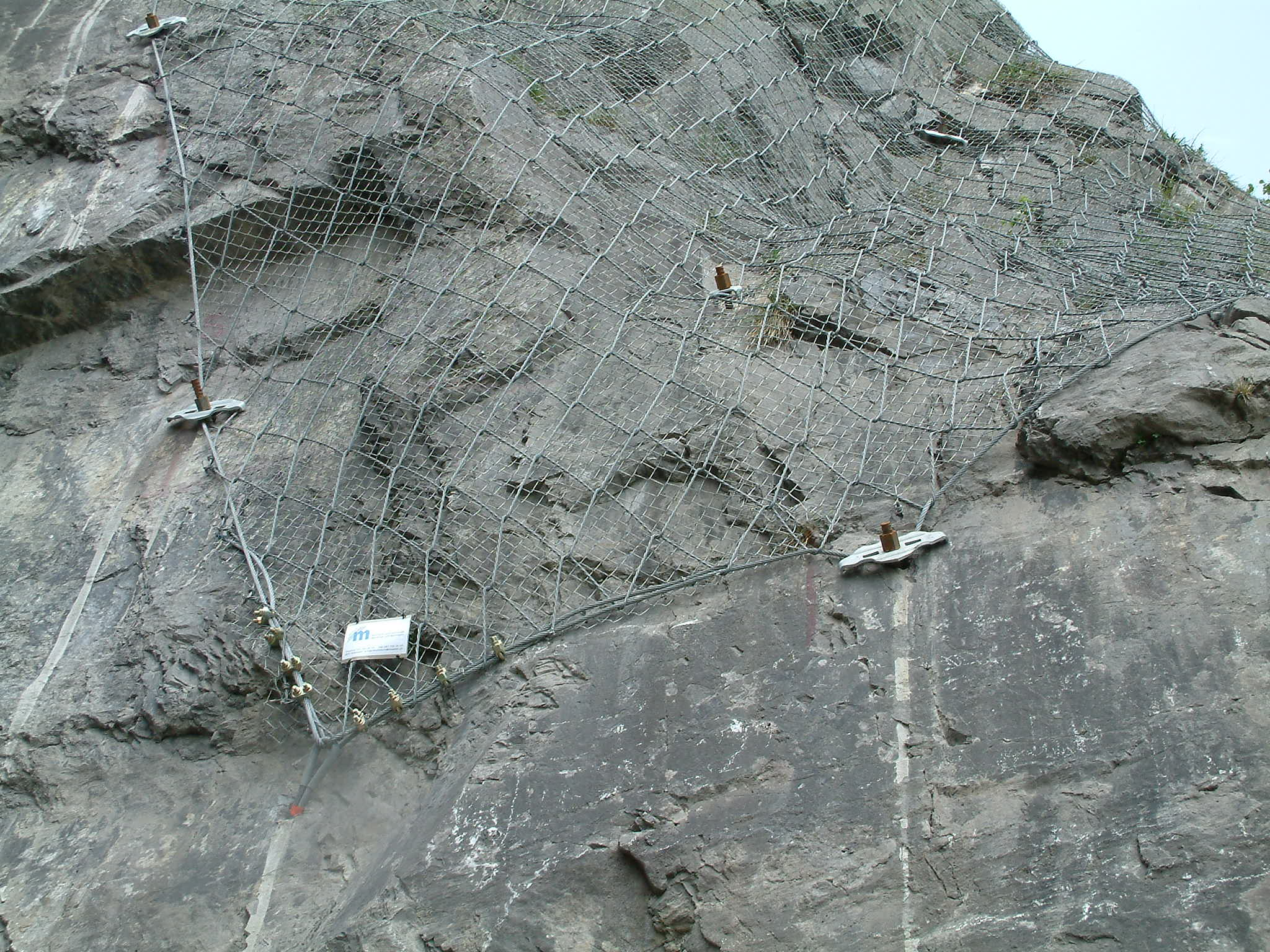 System SPIDER® jako aktywna ochrona przed obrywami dużej masy